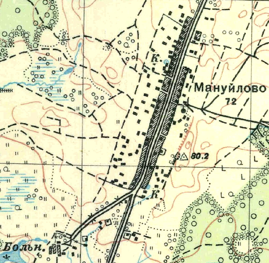 Топографическая карта Ленинградской области, квадрат О-35-22-Г-в (Мануйлово), деревня Мануйлово.